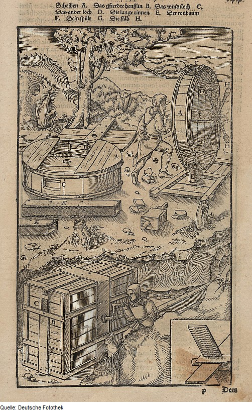 Original image description from the Deutsche Fotothek Bergwerk & Bergbau & Grubenbewetterung & Bewetterung & Wetterführung & Windfang & Wetterrad & Trommel